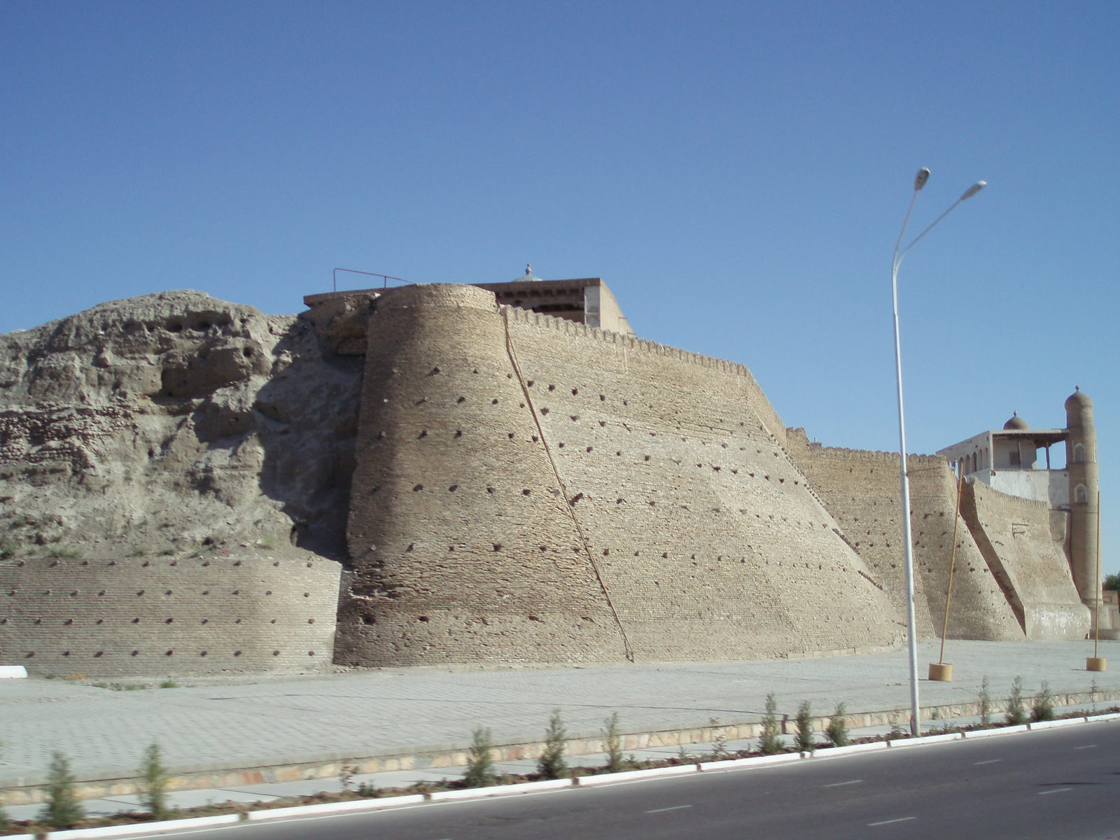 Forteresse Ark à Boukhara, Ouzbékistan - Ark Fortress Bukhara, Uzbekistan